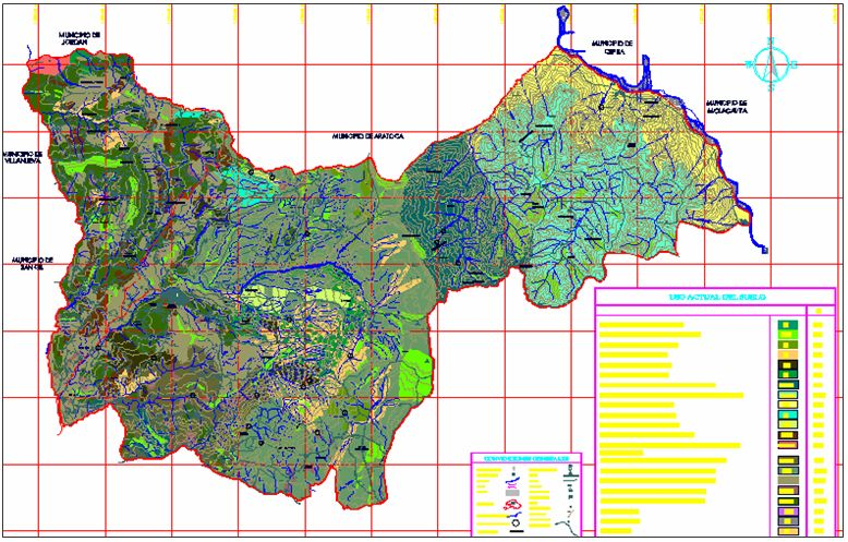 Mapa geográfico del municipio de Curíti